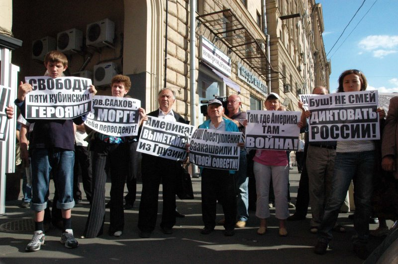 12 August 2008. Meeting against Saakashvili and USA near the U.S. embassy in Moscow. (Митинг против Саакашвили и США у американского посольства в Москве)